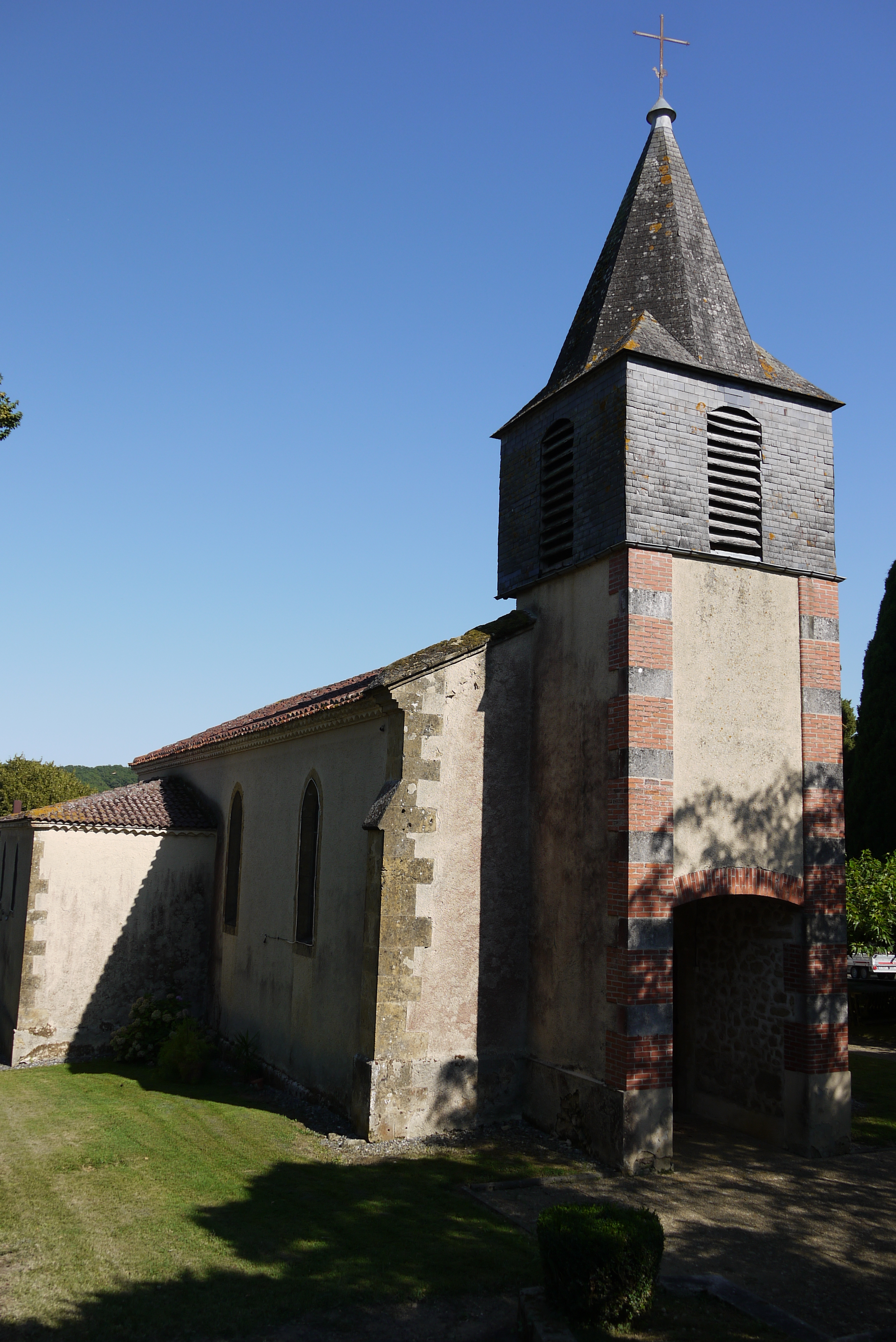 L'église de Clermont-Pouyguillès